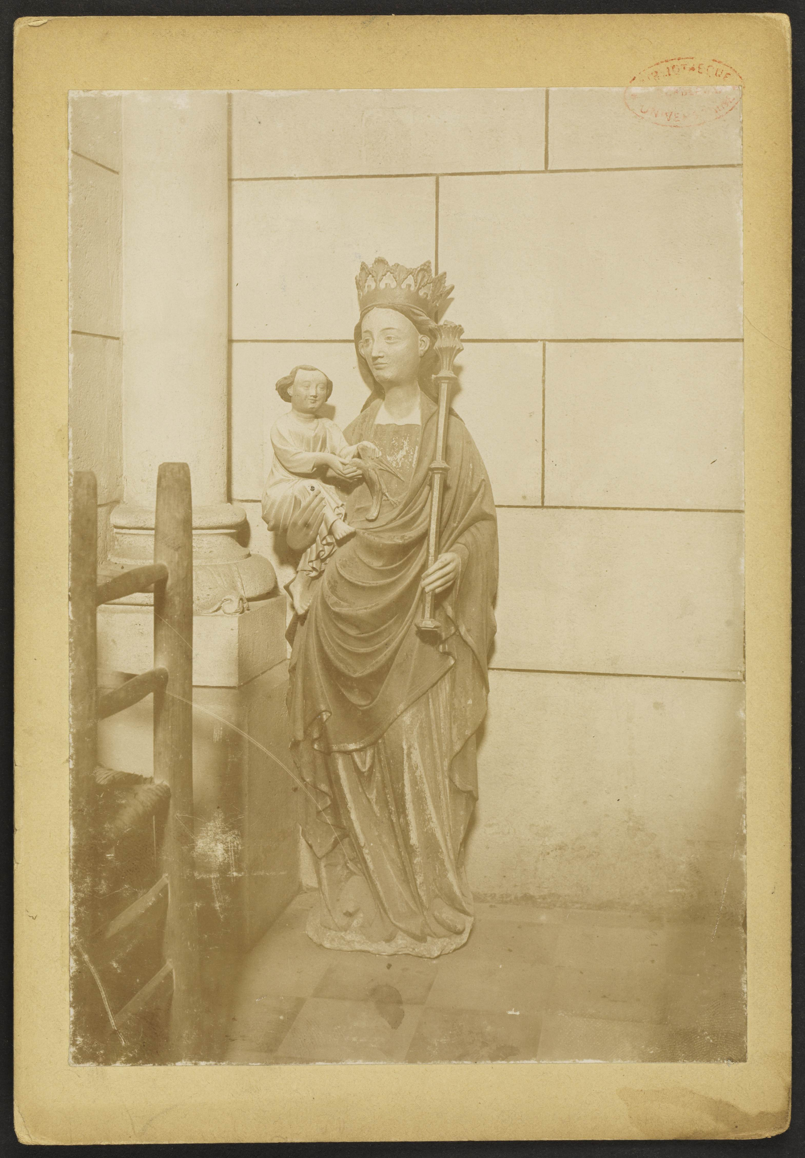 Église Saint-Martin de Cadillac; Vierge et enfant (albatre)